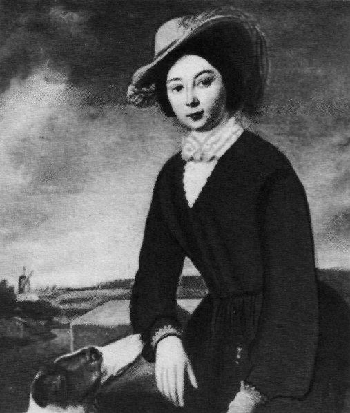 Анна Александровна Вонлярлярская (1834—1902)